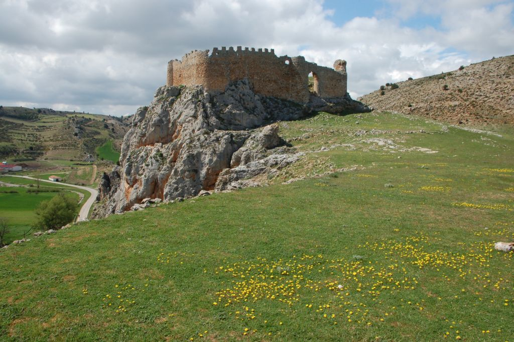 Ruinas del Castillo de Ciria, vestigio de las luchas fronterizas entre las tierras de Aragón y Castilla. Construido en mamposteria y piedra, en su interior se encuentra un foso en el que se han realizado catas arqueológicas que no han reportado informaciones destacadas.